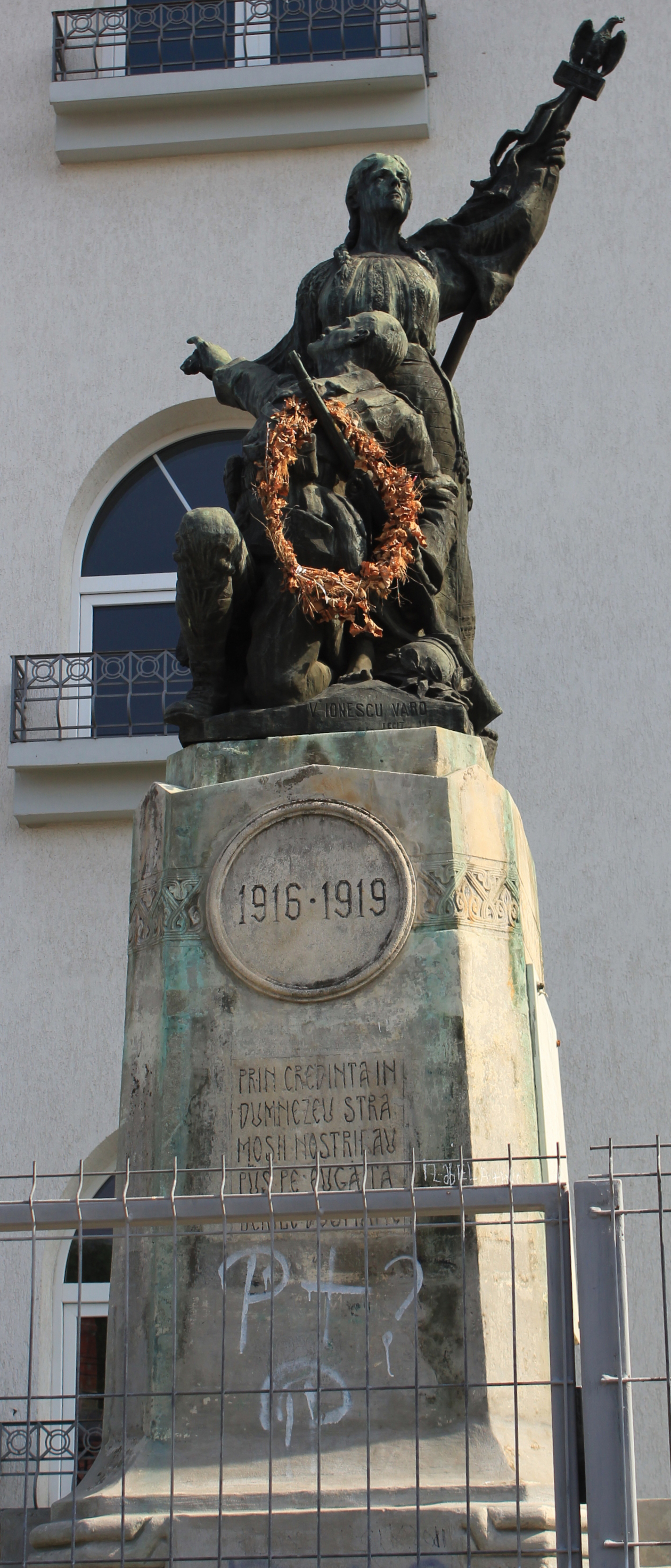 Monumentul eroilor din 1916-1918. Sculptor Vasile Ionescu-Varo (n. 1887, București - d. 1966). str Silvestru 34-36